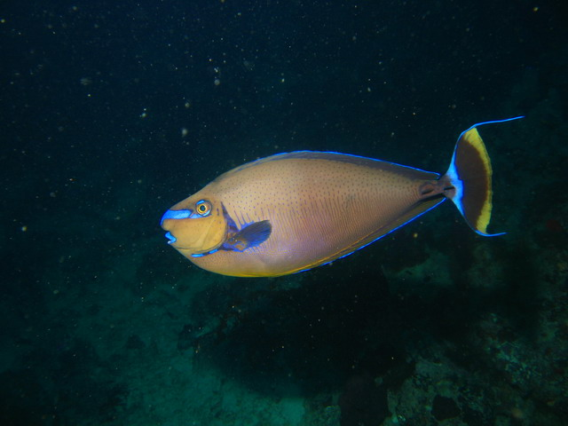 Nasendoktor (Naso vlamingii)